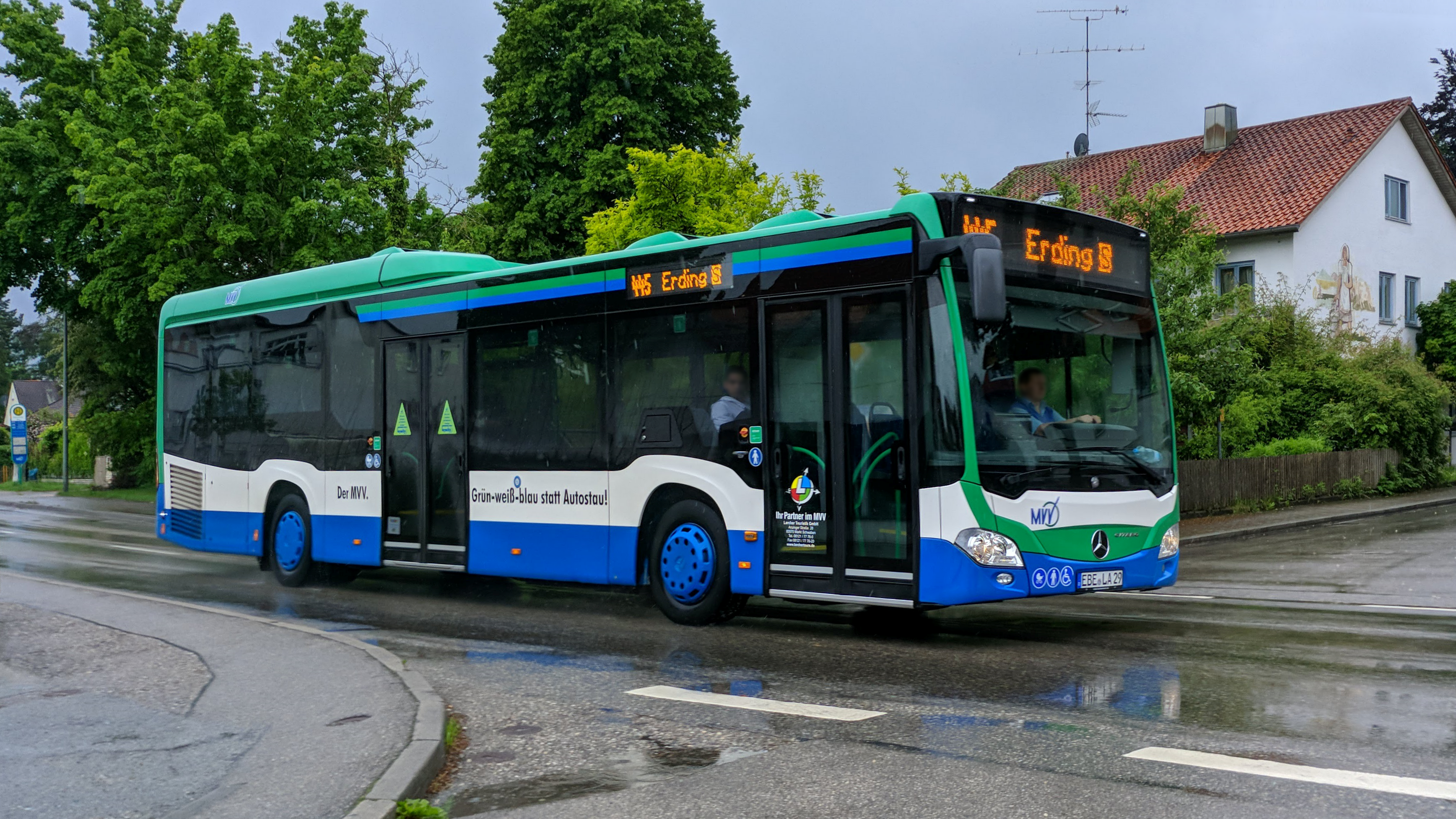 Ein Mercedes-Benz Citaro 2 LE von Larcher Touristik aus Markt Schwaben auf der MVV-Linie 445 von Ebersberg nach Erding, fotografiert in Forstern.